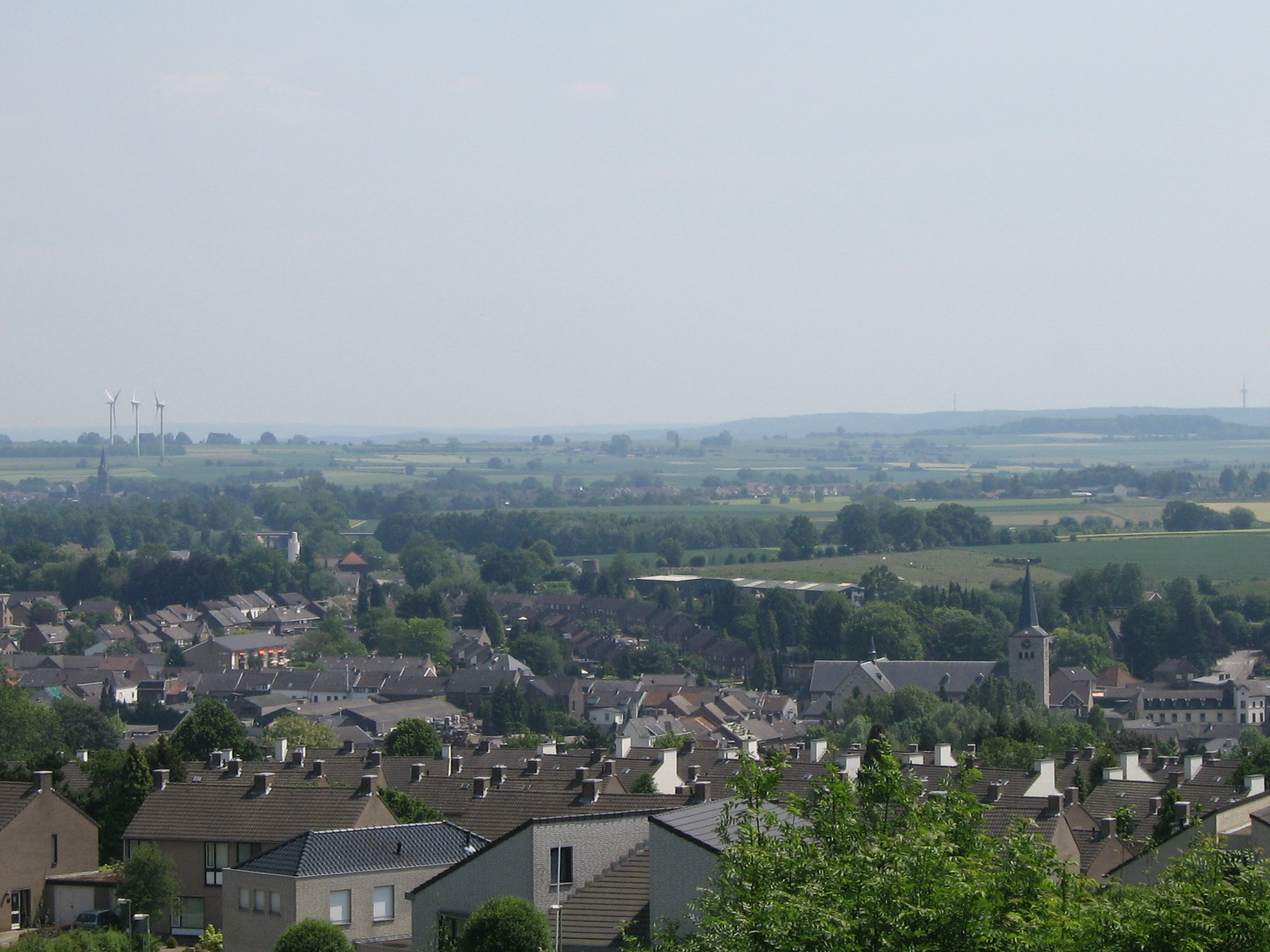 Zumpelveld/ Simpelveld (NL), bergaof gefotografeerd.